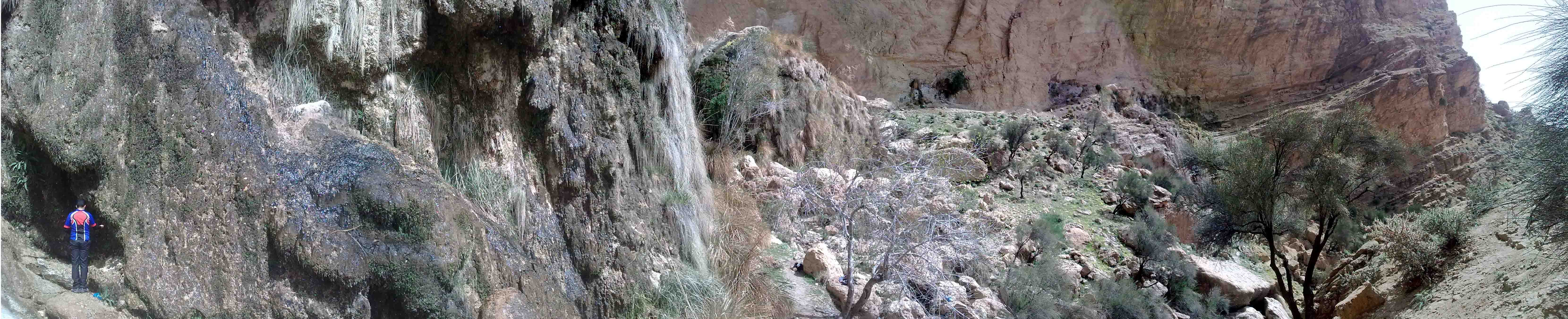 منطقه تفریحی رحمت آباد جویم-تصویر پاناروما